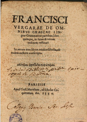 Francisci Vergarae de omnibus graecae linguae grammaticae partibus libri ..., 1550, Francisco de Vergara (1484-1545)